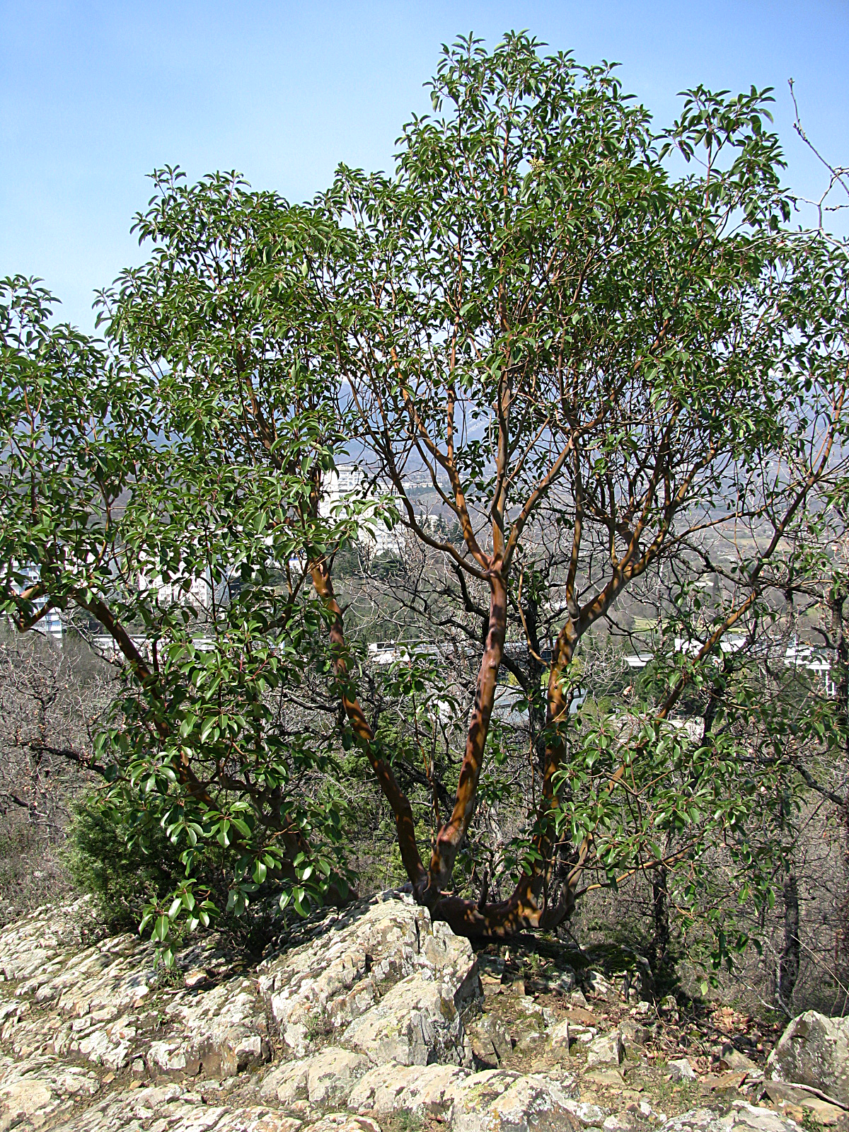 Cуничне дерево дрібноплідне: Cуничне дерево дрібноплідне на горі Аю-Даг